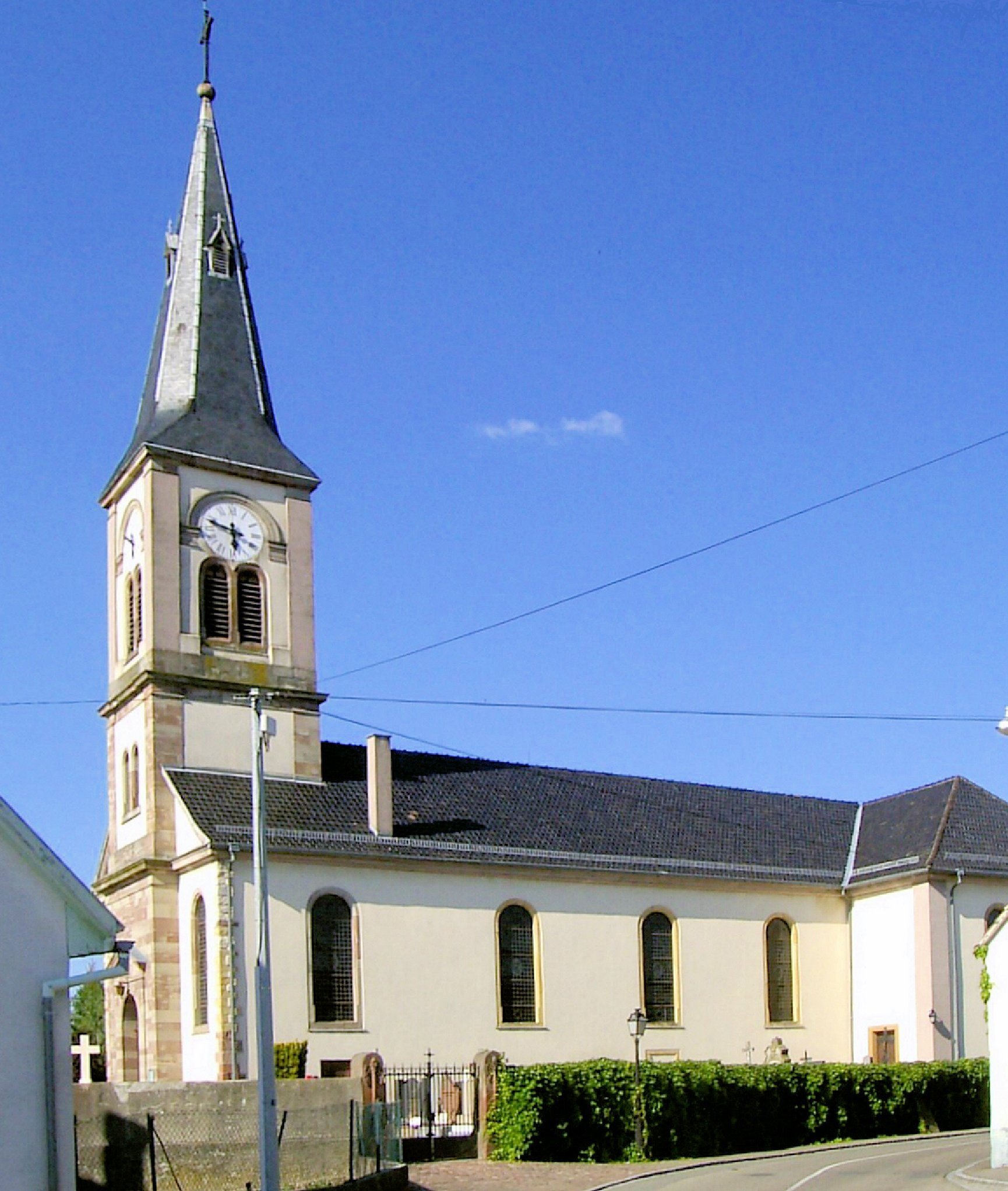 L'église Saint-Blaise à Blodelsheim